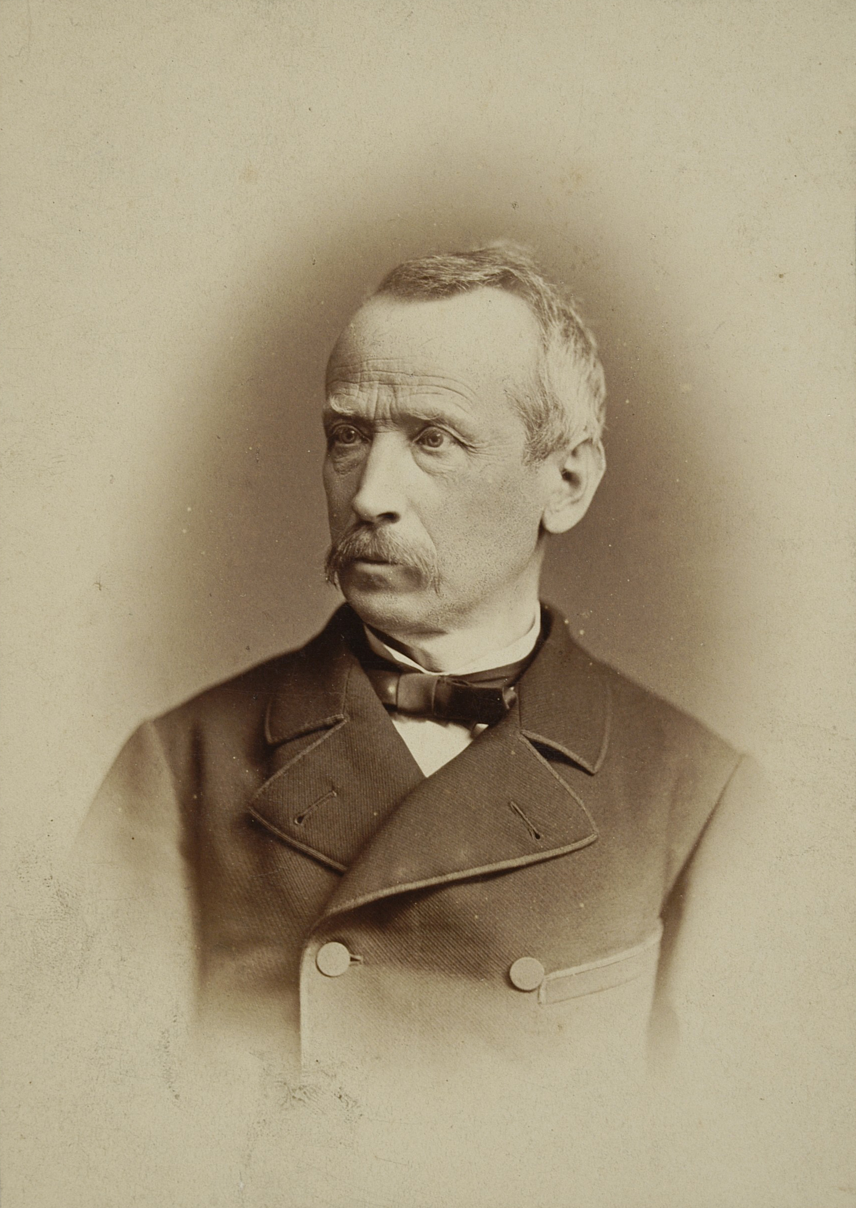 Julian Dunajewski, ok. 1880 r.